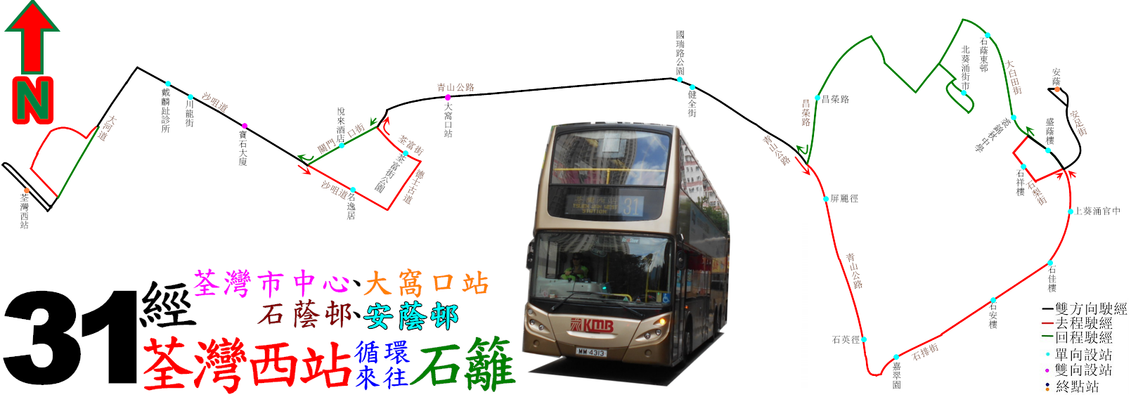 中文（香港）: 九龍巴士31線的走線圖